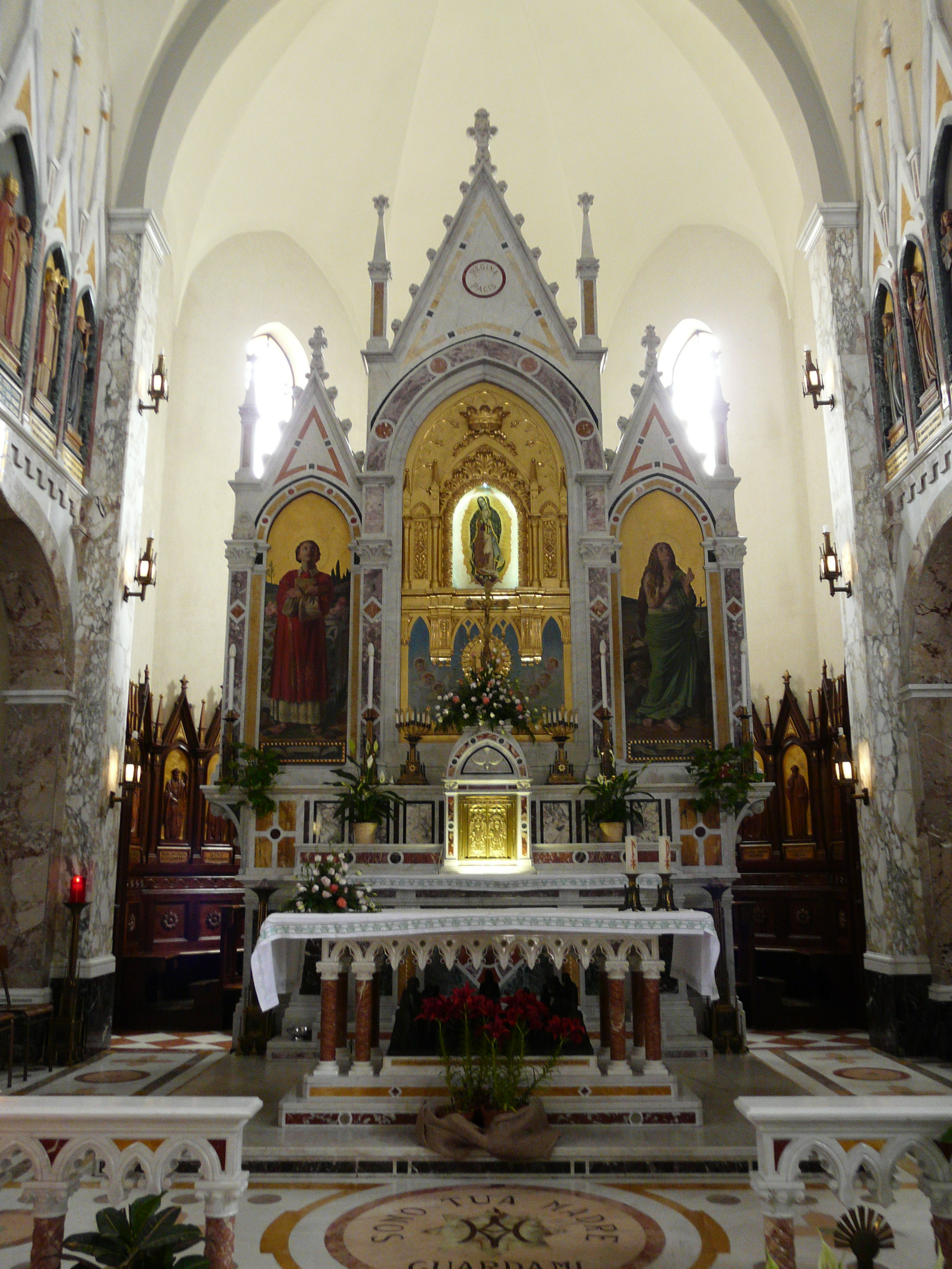 Altare del santuario della Madonna di Guadalupe, Santo Stefano d'Aveto, Liguria, Italia